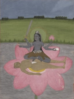 La déesse Kali assise sur un homme. Illustration extraite d'un recueil de peintures (divinités hindoues).